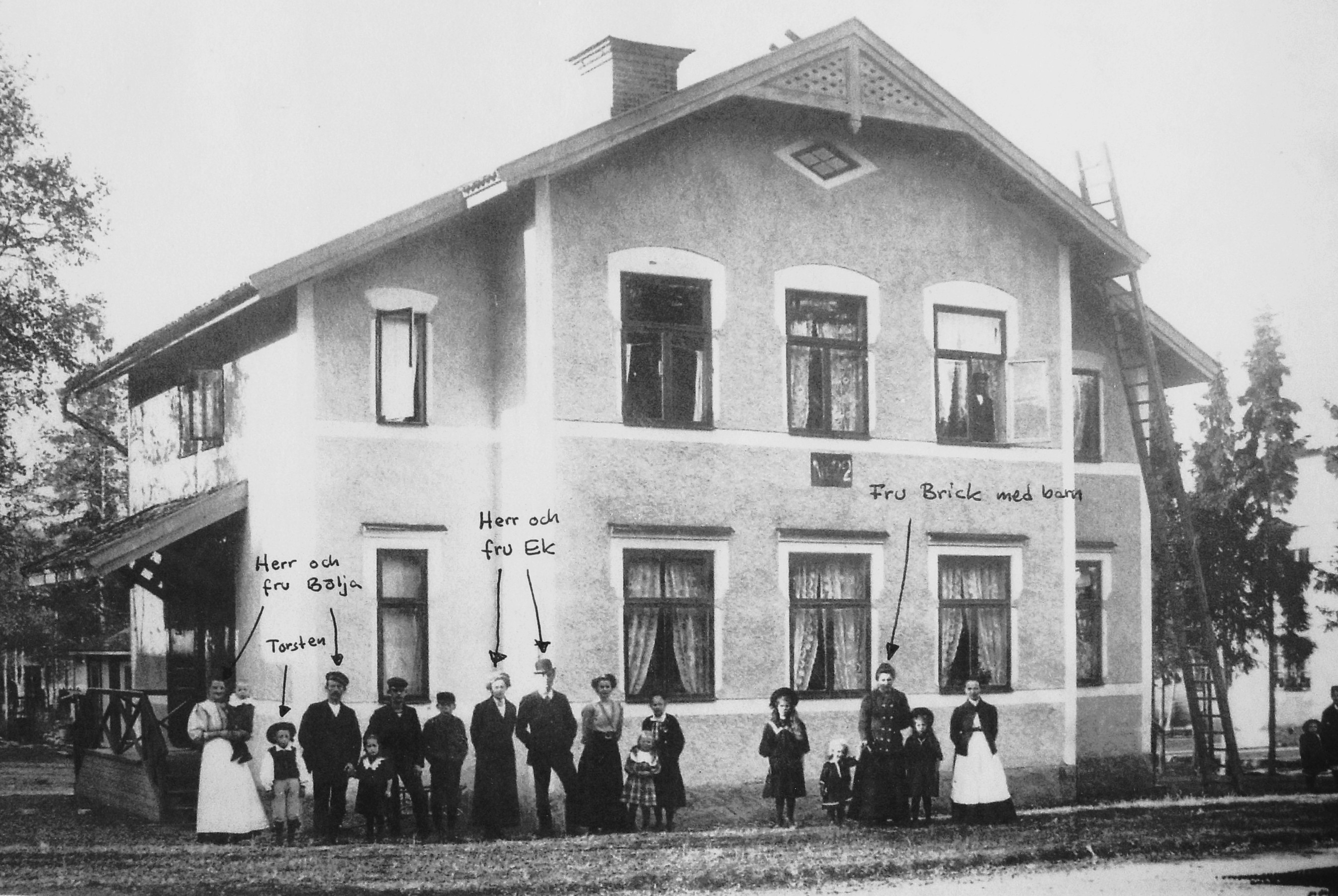 Arbetarbostad i Stora Hagen